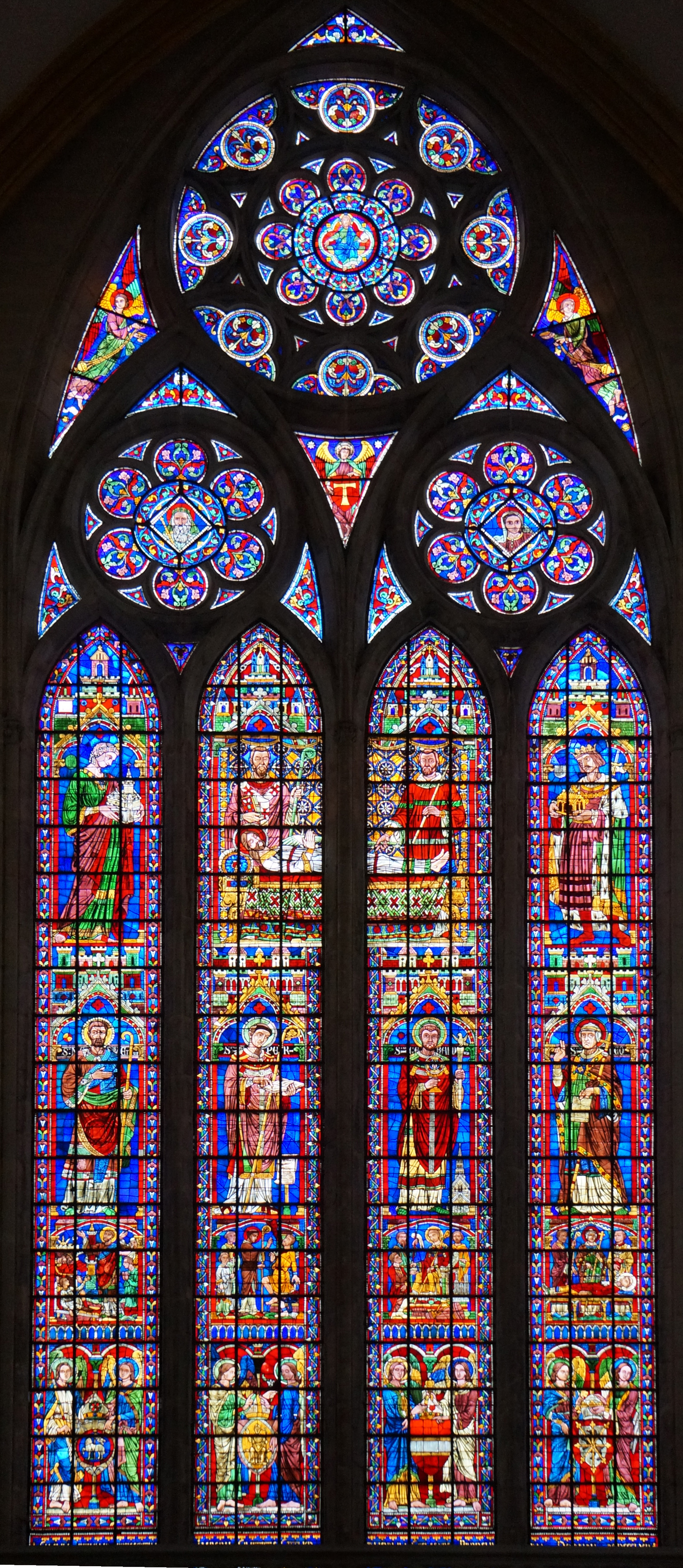 Vitrail de la Cathédrale Saint-Étienne de Toul par Coffetier Nicolas et Casimir Alexandre Victor Balthazar de Gacheo .